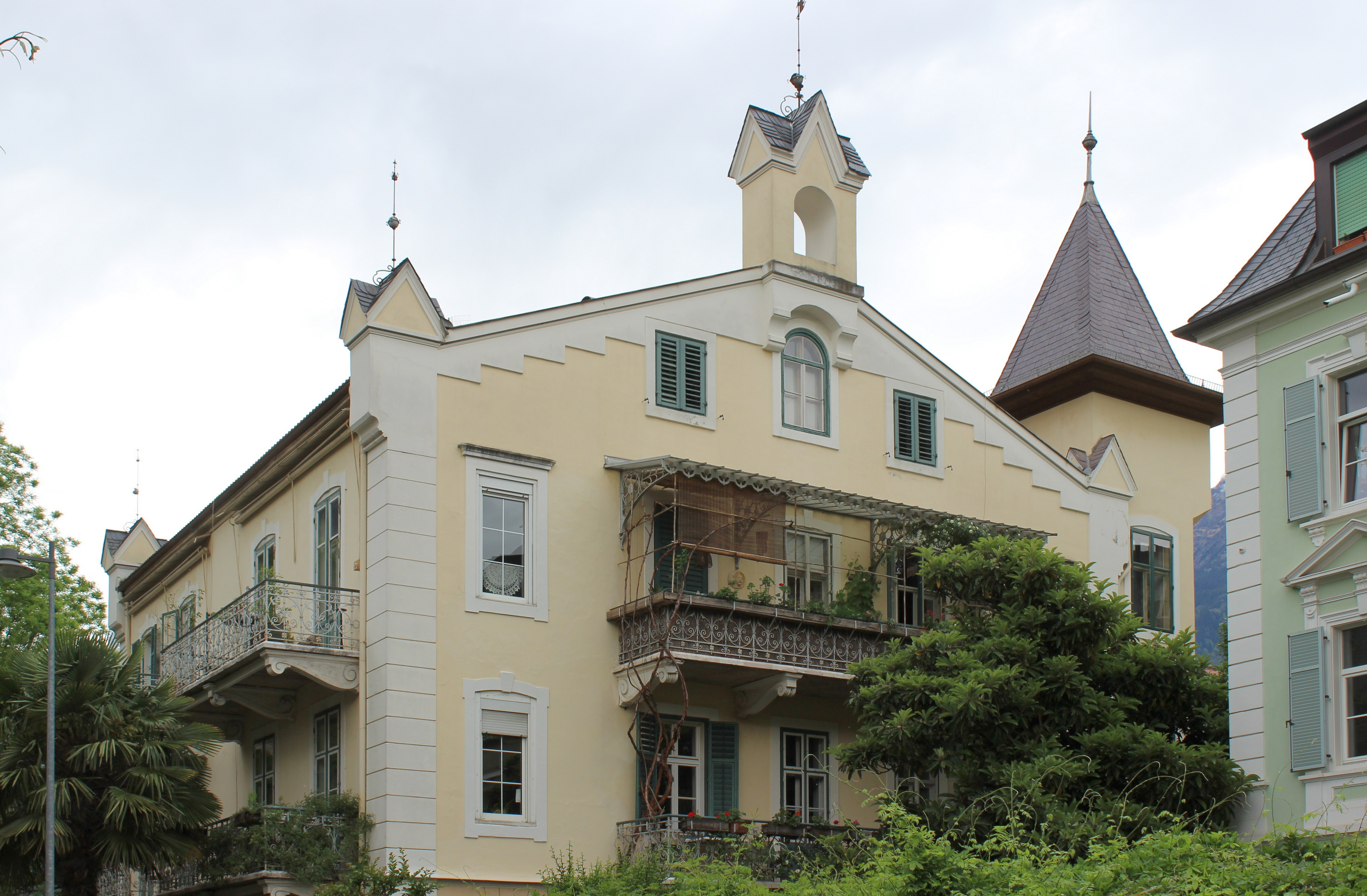 Carduccistraße 22-26 in Meran, Villa Bruckmüller